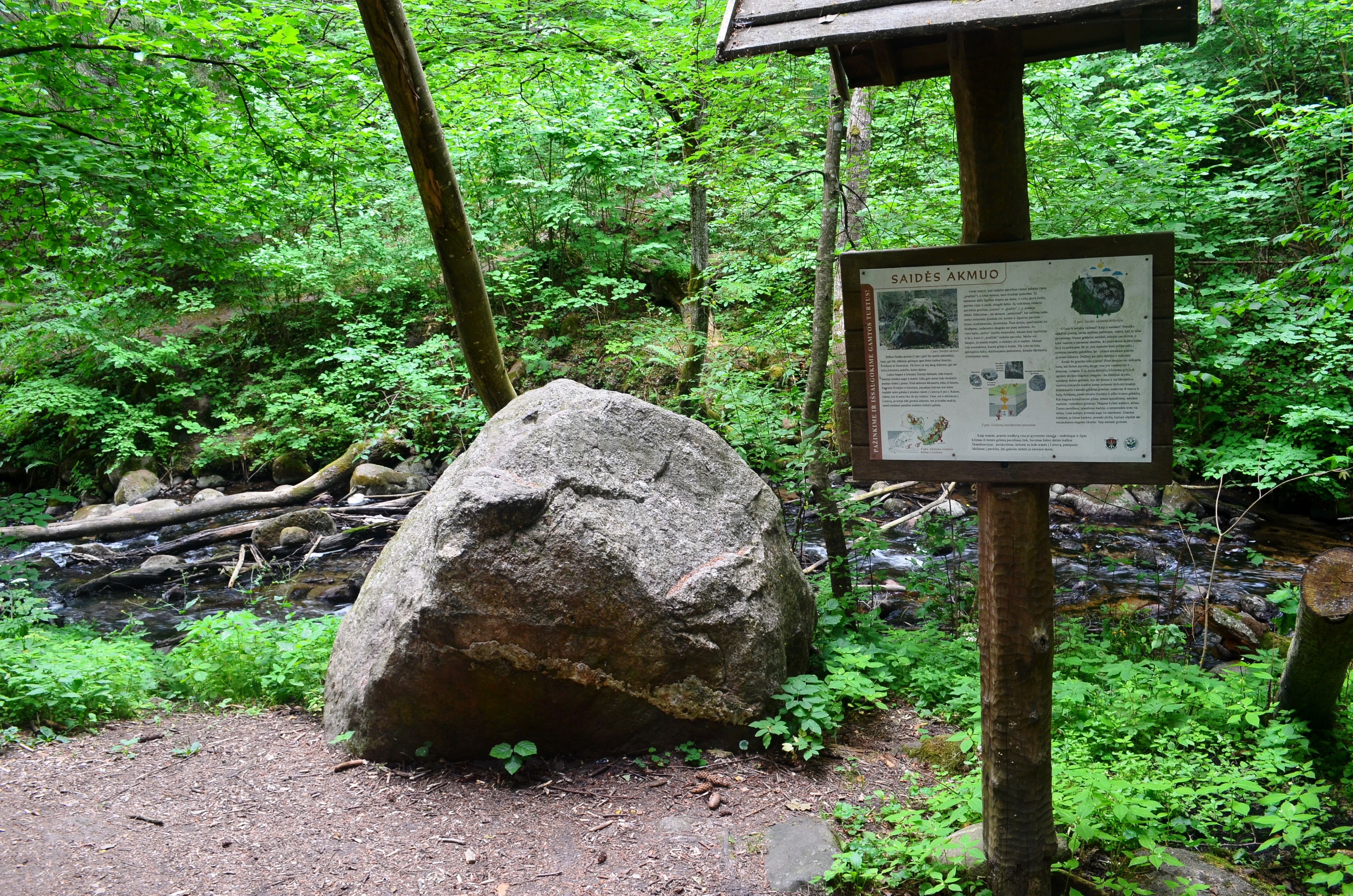 Saidės akmuo, Trakų raj.